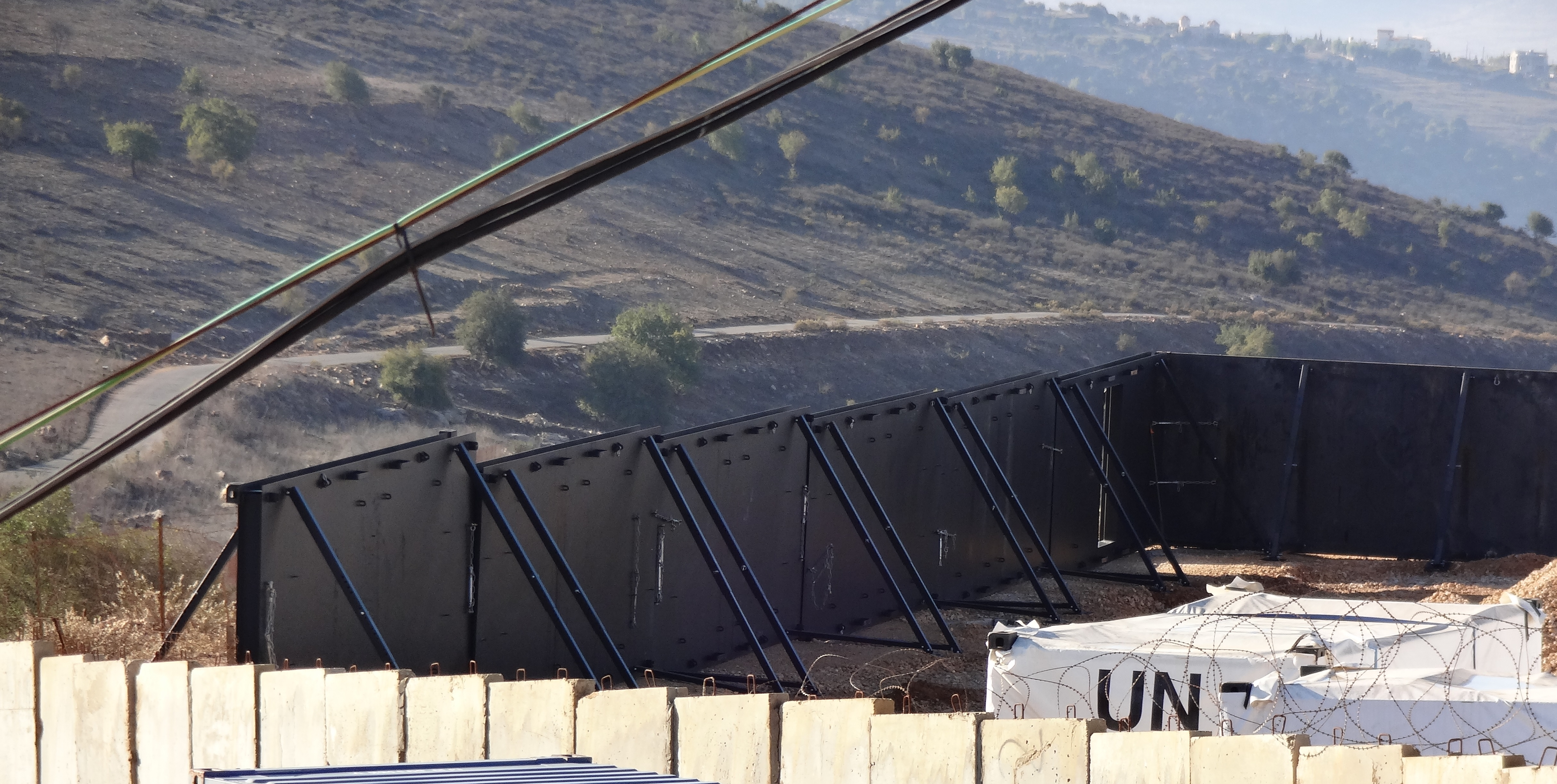 Balpro suojaseinä käytössä UN operaatiossa Libanonissa